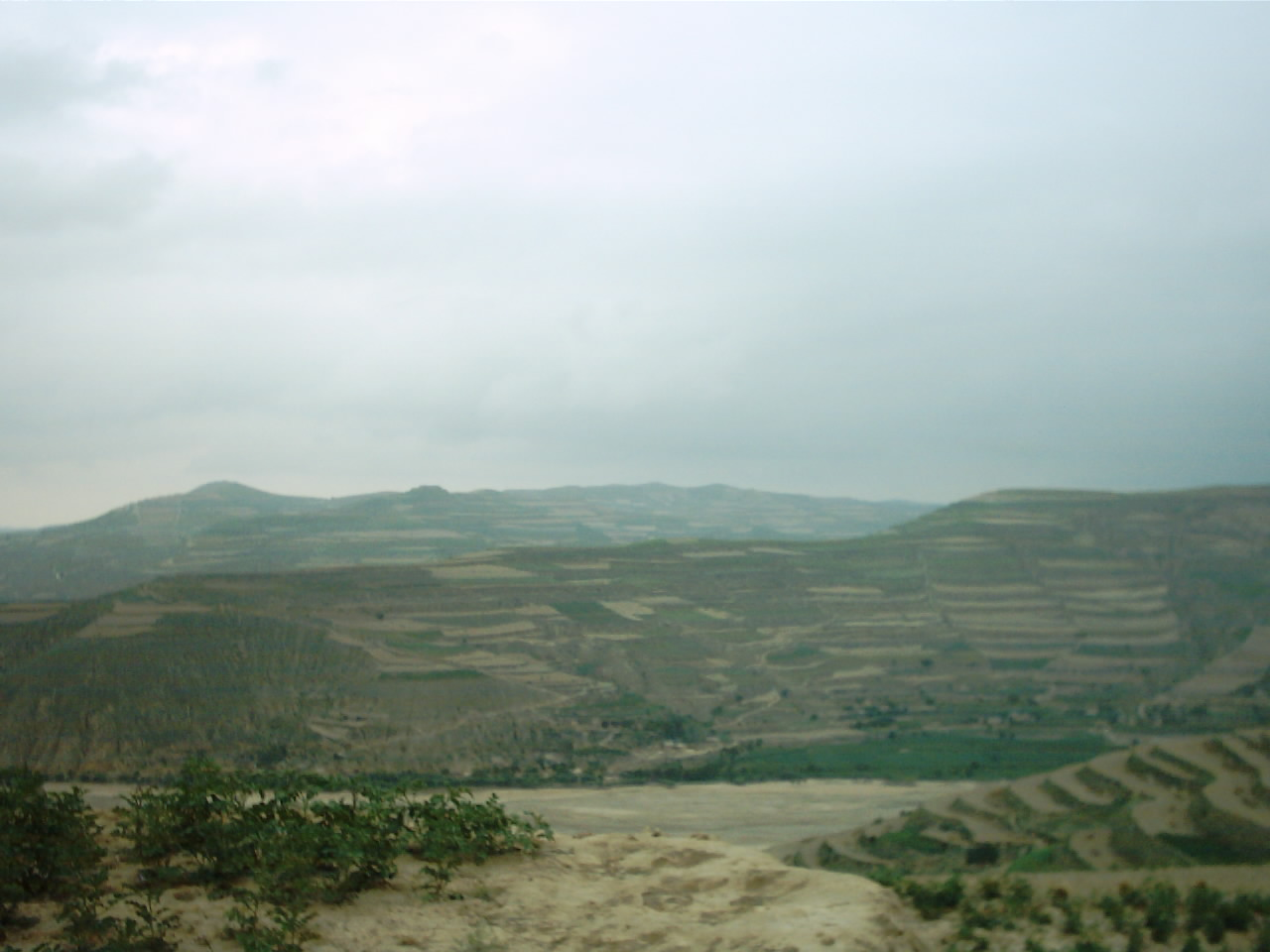 金牛河畔